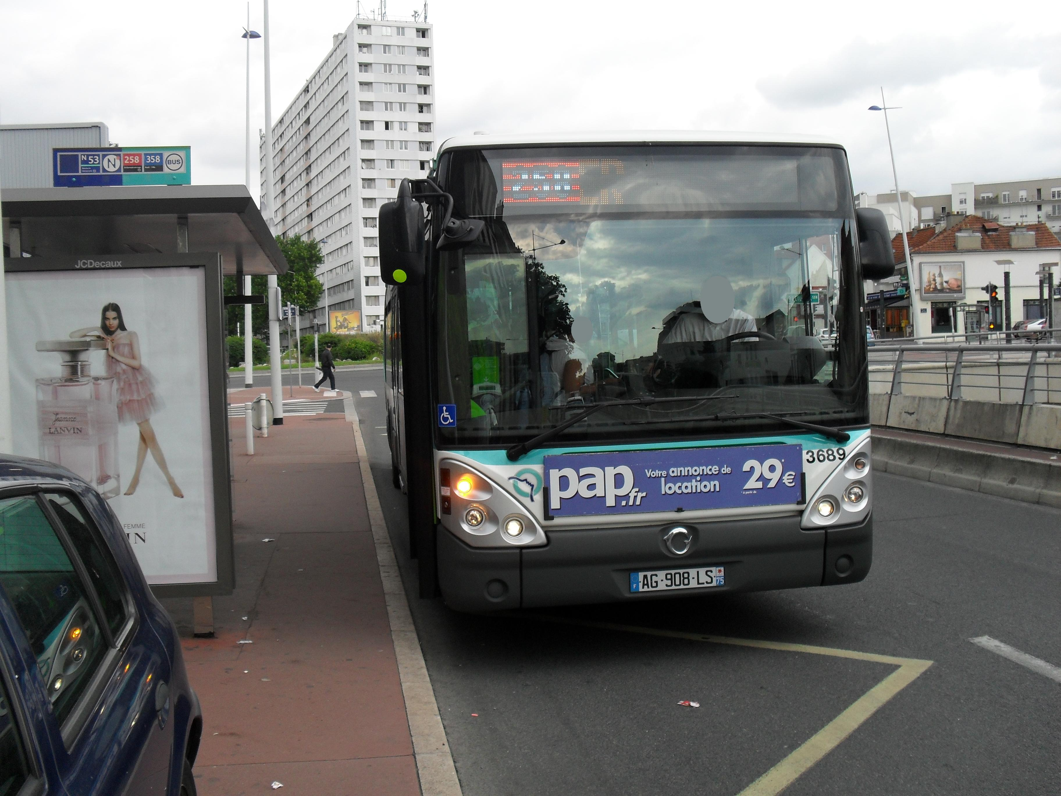 Ligne RATP 258